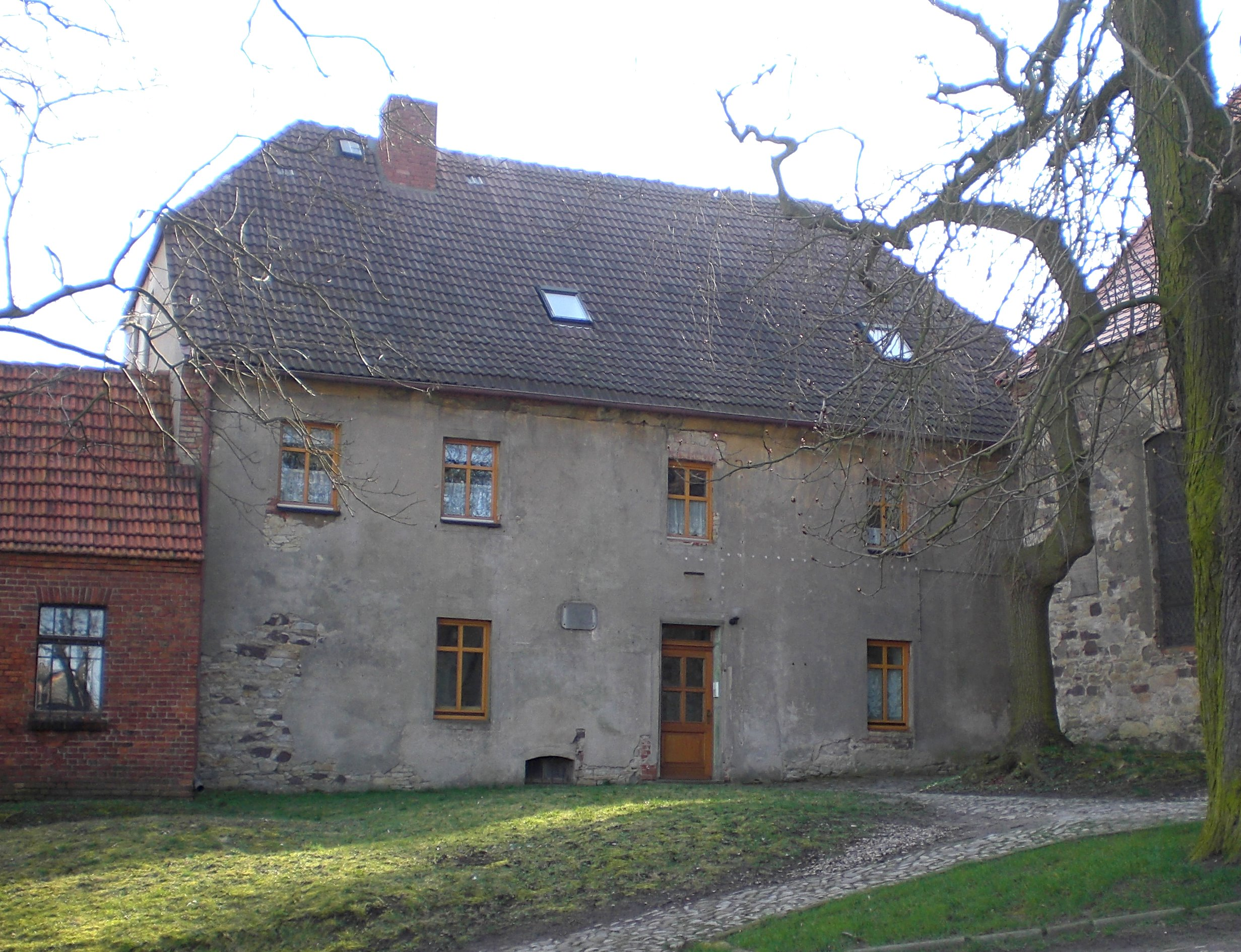 Pfarrhaus der St.-Peter-Kirche in Hohendodeleben, Sachsen-Anhalt, zugleich Geburtshaus von F.v.Matthison